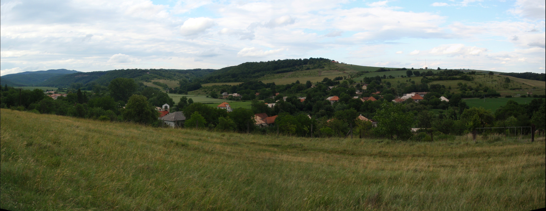 Obec Súdovce